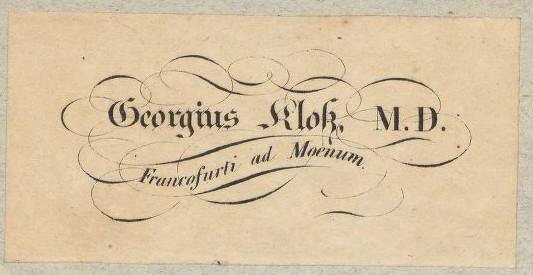 Exlibis von Georg Kloss